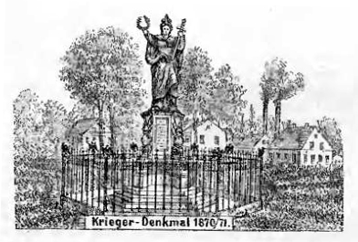 Das Germania-Denkmal auf dem Germania-Platz in Gleiwitz um 1900